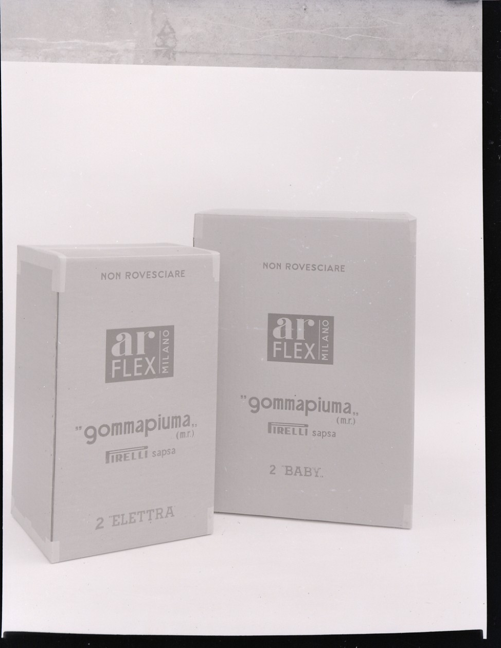 Arredamento per soggiorni e uffici dell'azienda Ar-Flex e confezione di Gommapiuma dell'azienda Pirelli. Servizio fotografico : Milano, 1975 / Paolo Monti. - Buste: 11, Fototipi: 11 : Negativo b/n, gelatina bromuro d'argento/ pellicola ; 10x12. - ((Serie costituita da 4 negativi identificati con i nn.: 5353-5356. Sulla busta G5253 manoscritto: "Ar-Flex/ Prove - Catalogo". La suddetta serie è contenuta nella scatola identificata con la numerazione G5253-5391. Sul coperchio della scatola manoscritto: "Ar-Flex". - Fonte: Rubrica di Paolo Monti: Archivio 10x12 (ultimi numerati) - dal G1 al (s.d.), presso Archivio Paolo Monti